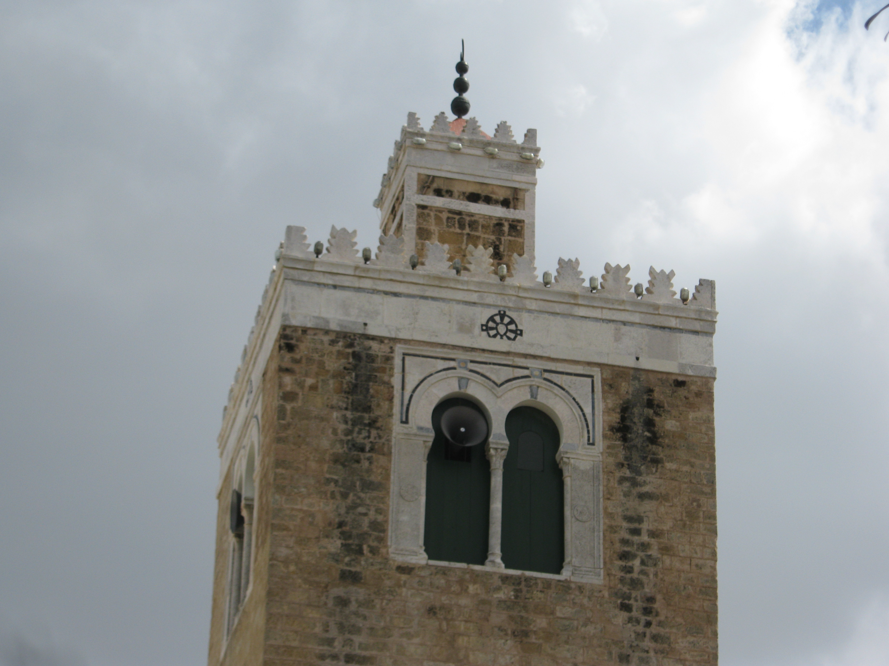 minaret de la mosquée el houa